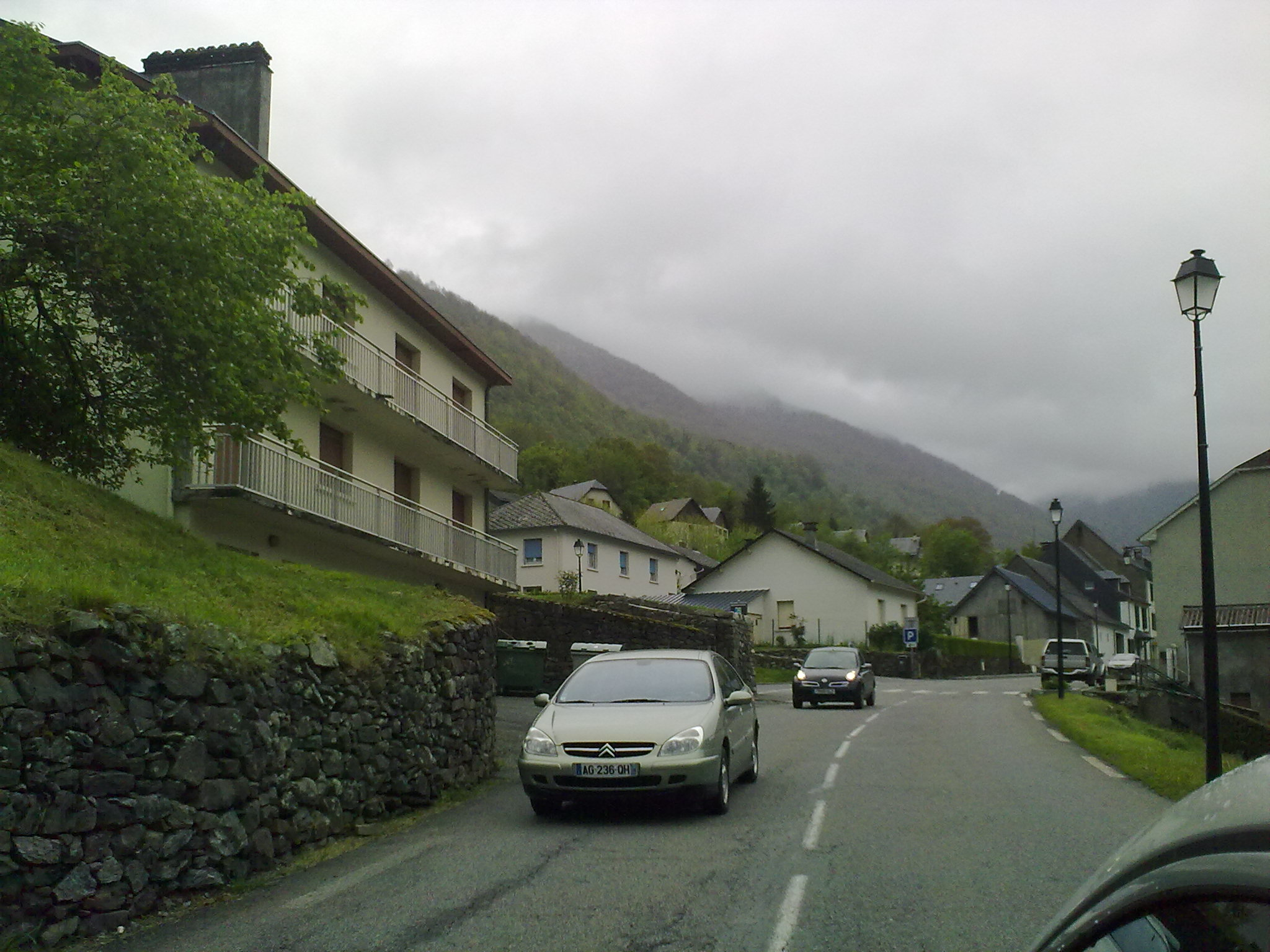 Urdos, France